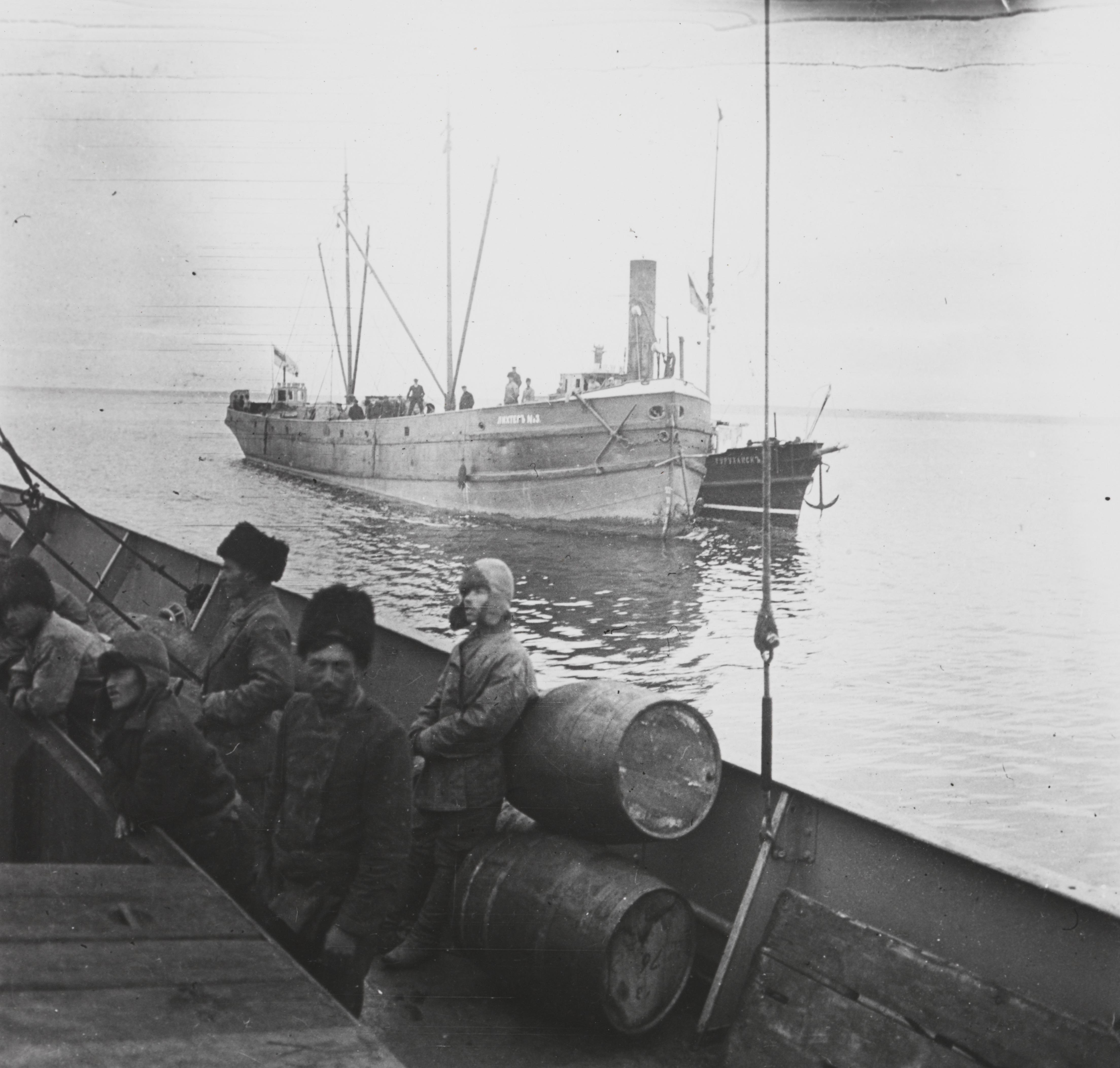 «Correct» møter en russisk lekter og slepebåt «Turukhansk» ved munningen av Jenisej. Her forlot de reisende skipet, men Jonas Lied ble igjen om bord. Ett av bildene fra reisen til Sibir i perioden 2. august-26. oktober 1913. Fridtjof Nansen startet sin transsibirske reise med et handelsskip fra Oslo til Jenisej. Ferden gikk gjennom deler av nordøstpassasjen som skulle åpne for en kortere handelsforbindelse mellom Vest Europa og Det Fjerne Østen. Depicted person: Lied, Jonas (1881-) Depicted place: Russland, Nosonovskij Pesok